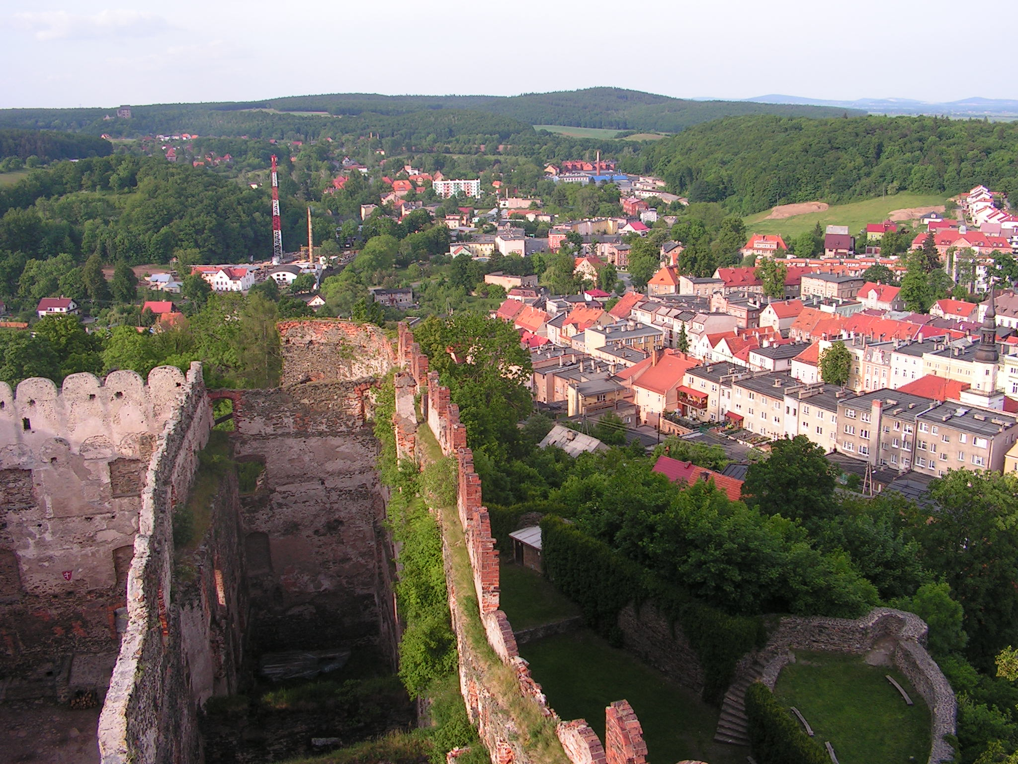 Bolków - zamek